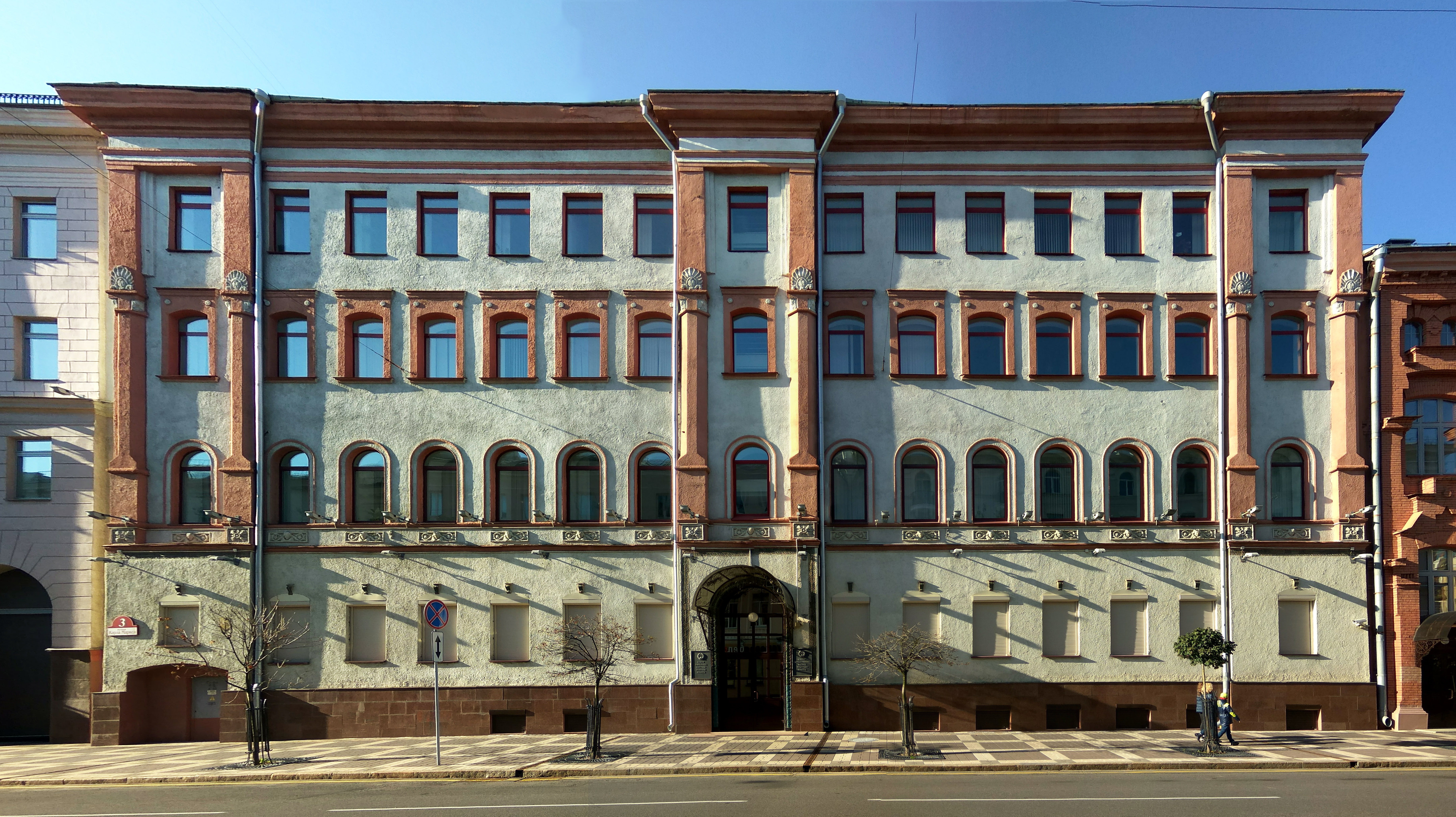 Будынак КДК Беларусі